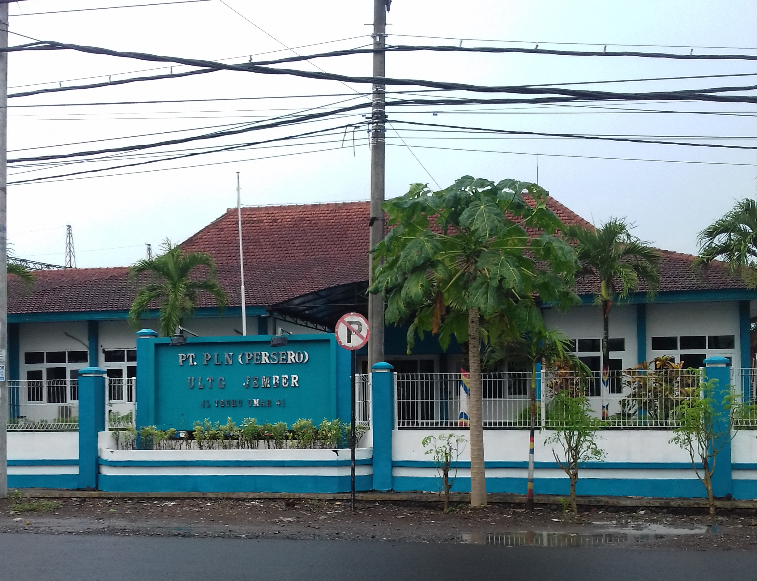 Kantor PLN ULTG Jember